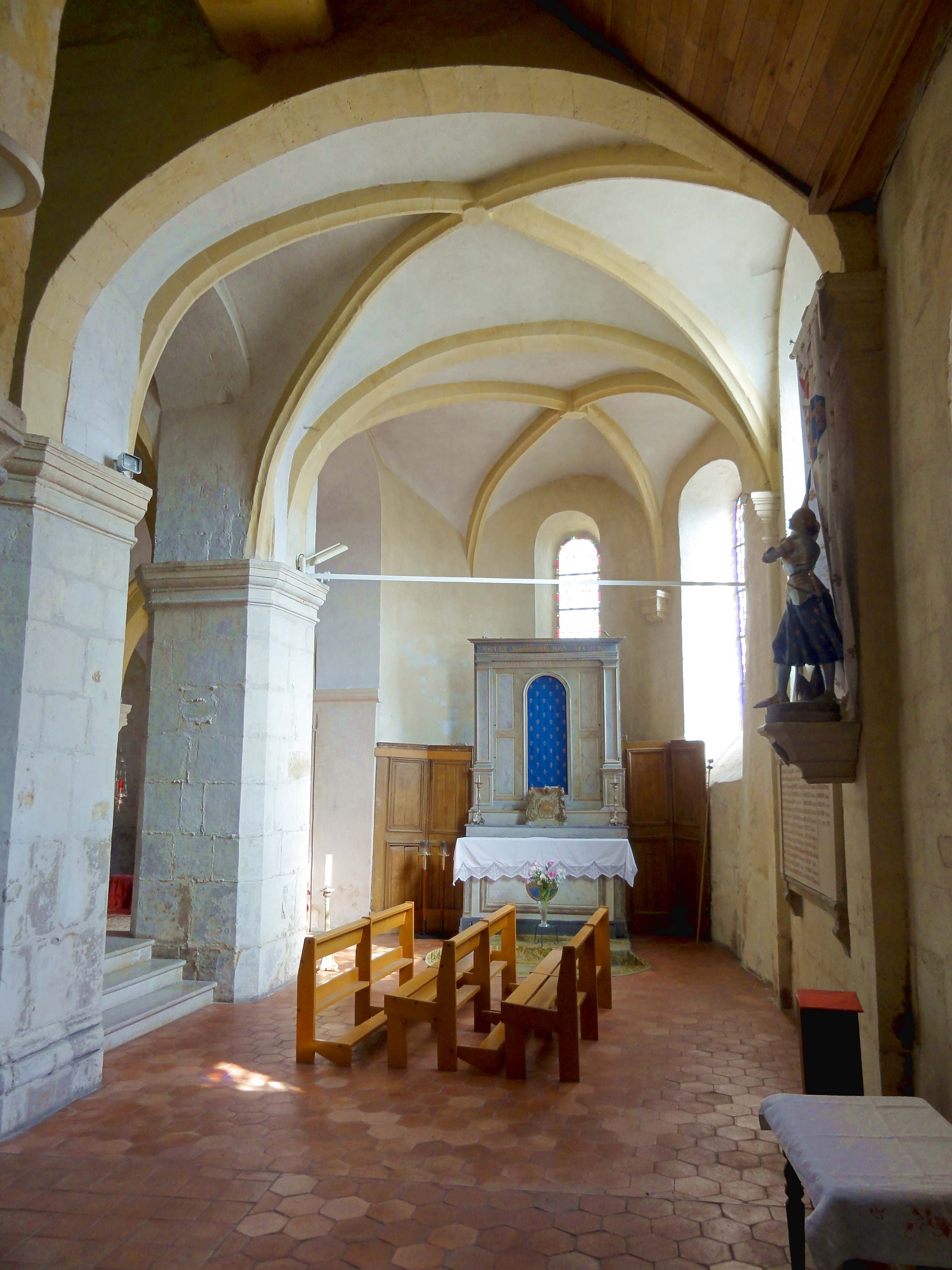 Intérieur de l'église - voir titre.